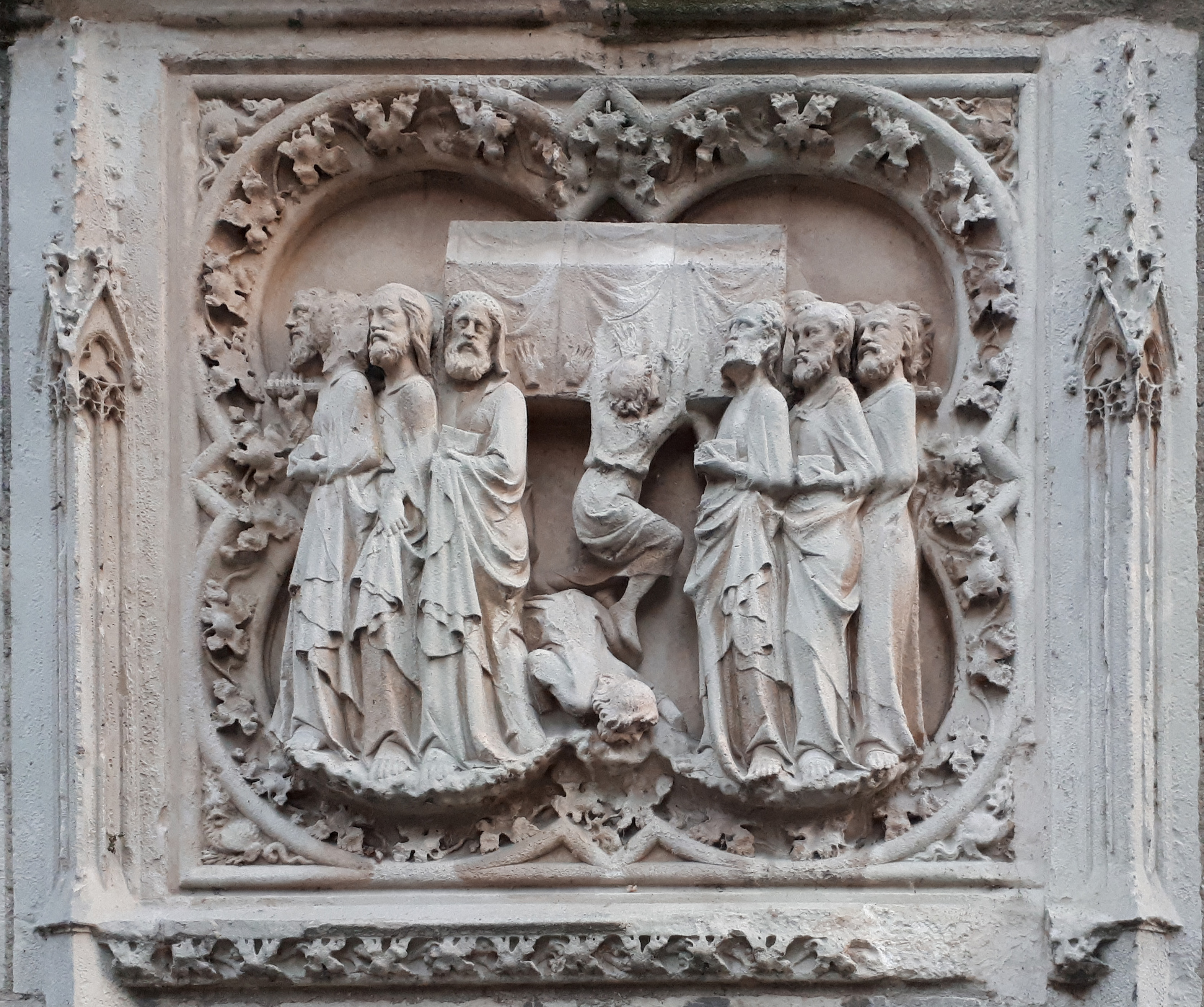 I funerali della Vergine.